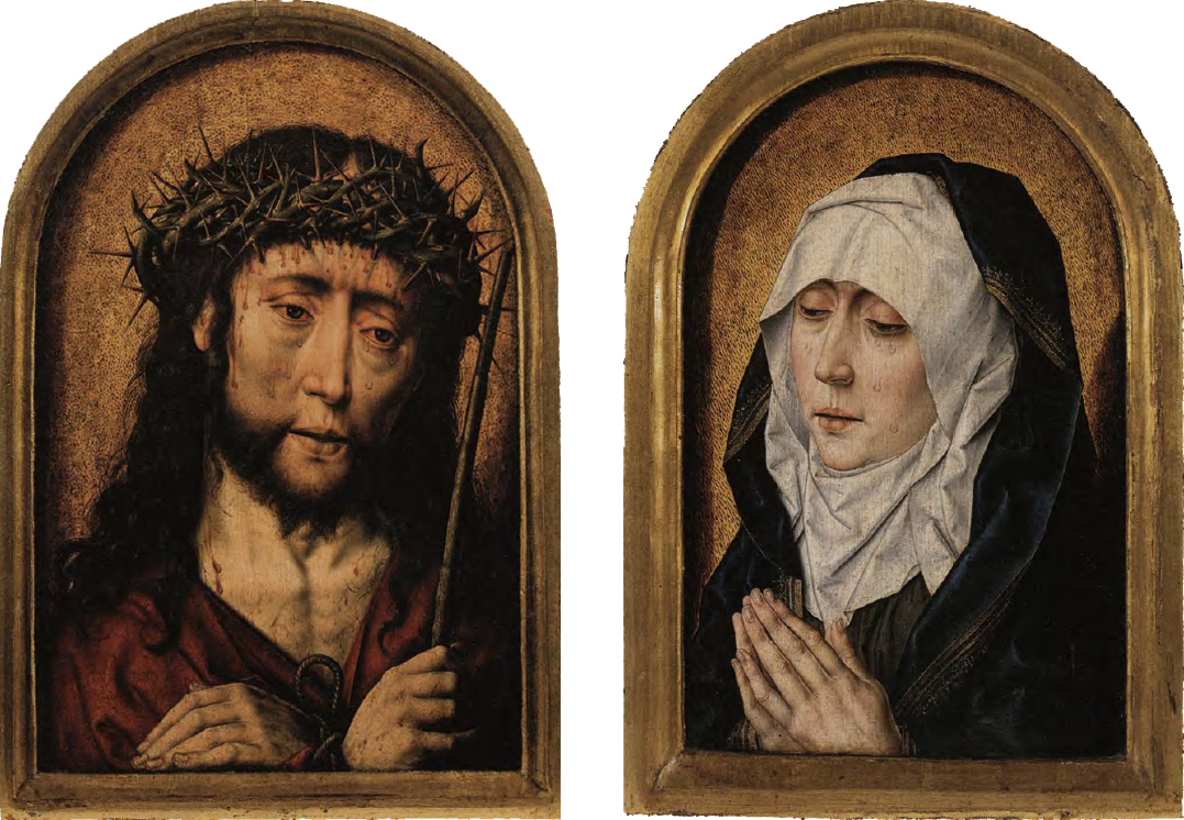 Albrecht Bouts, Diptiek met Ecce Homo en Mater Dolorosa, Suermondt-Ludwig-Museum Aken This image is available from the Netherlands Institute for Art Historyunder digital ID 237711. This tag does not indicate the copyright status of the attached work. A normal copyright tag is still required. See Commons:Licensing.